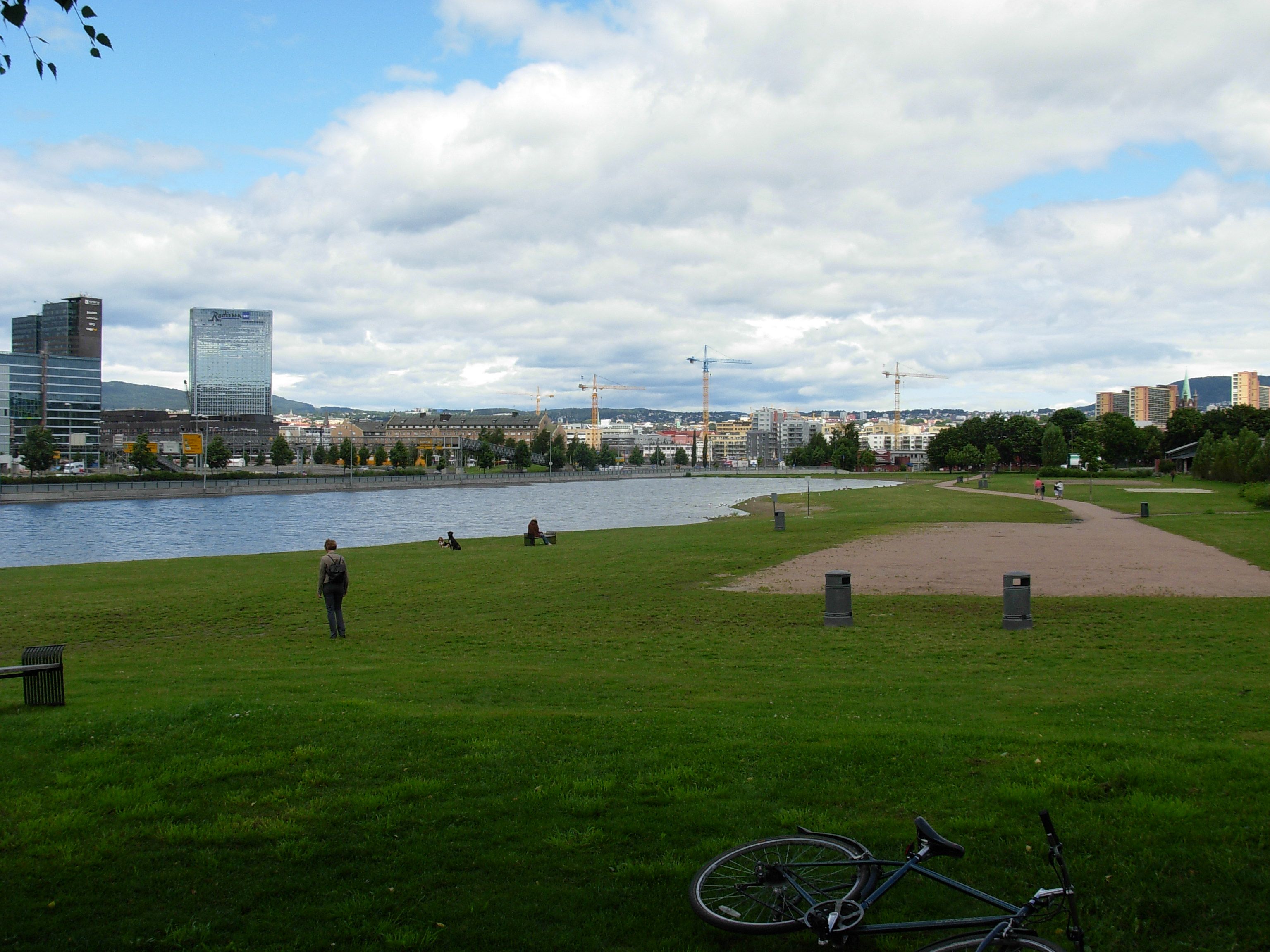 Middelalderparken, Oslo